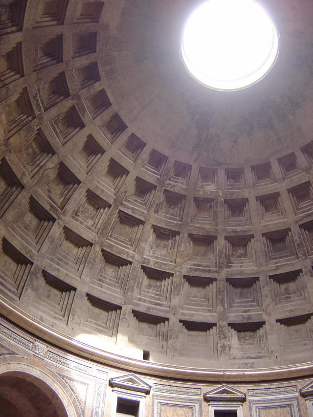 Pantheon innen